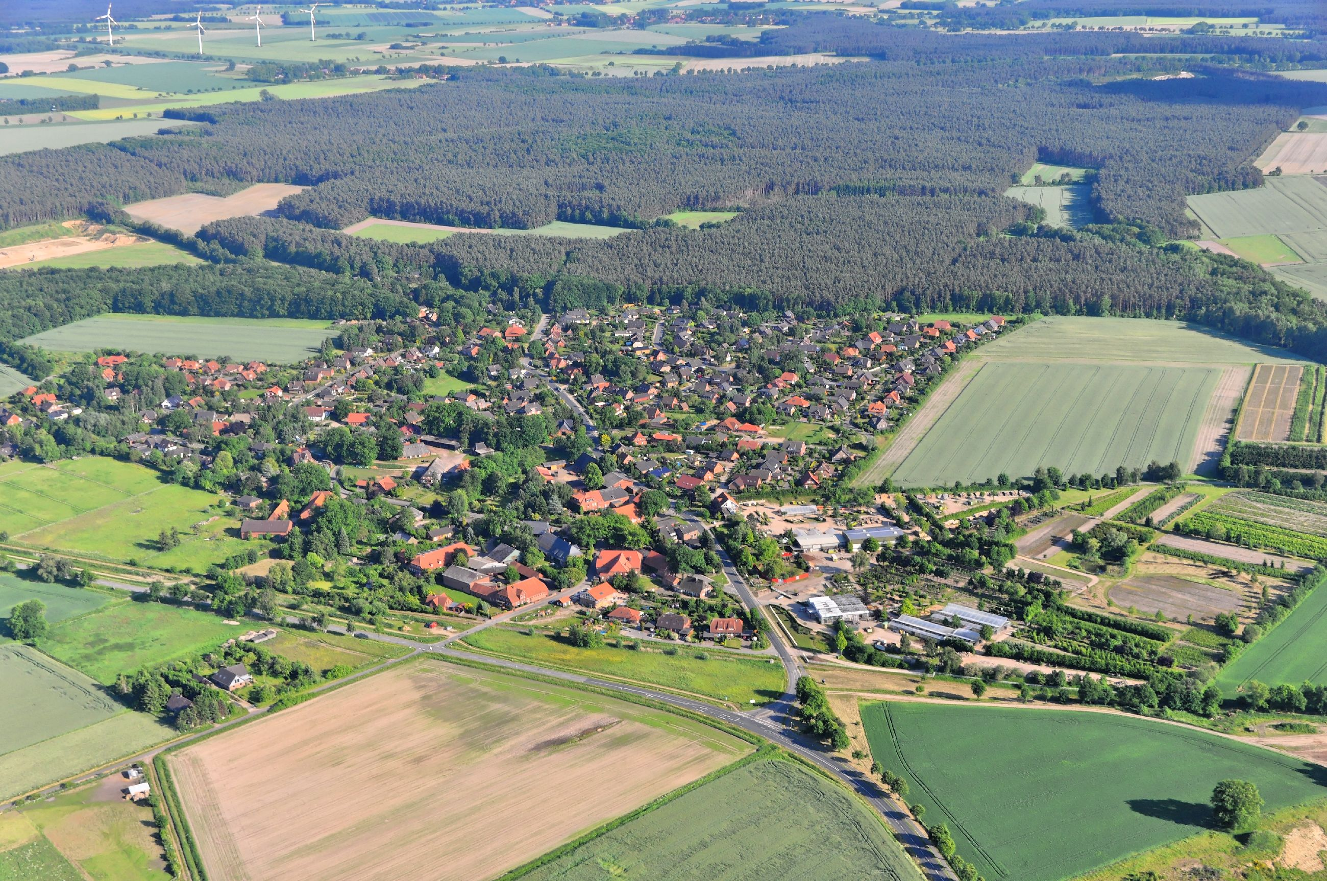 Rullstorf. Überführungsflug vom Flugplatz Nordholz-Spieka über Lüneburg, Potsdam zum Flugplatz Schwarzheide-Schipkau